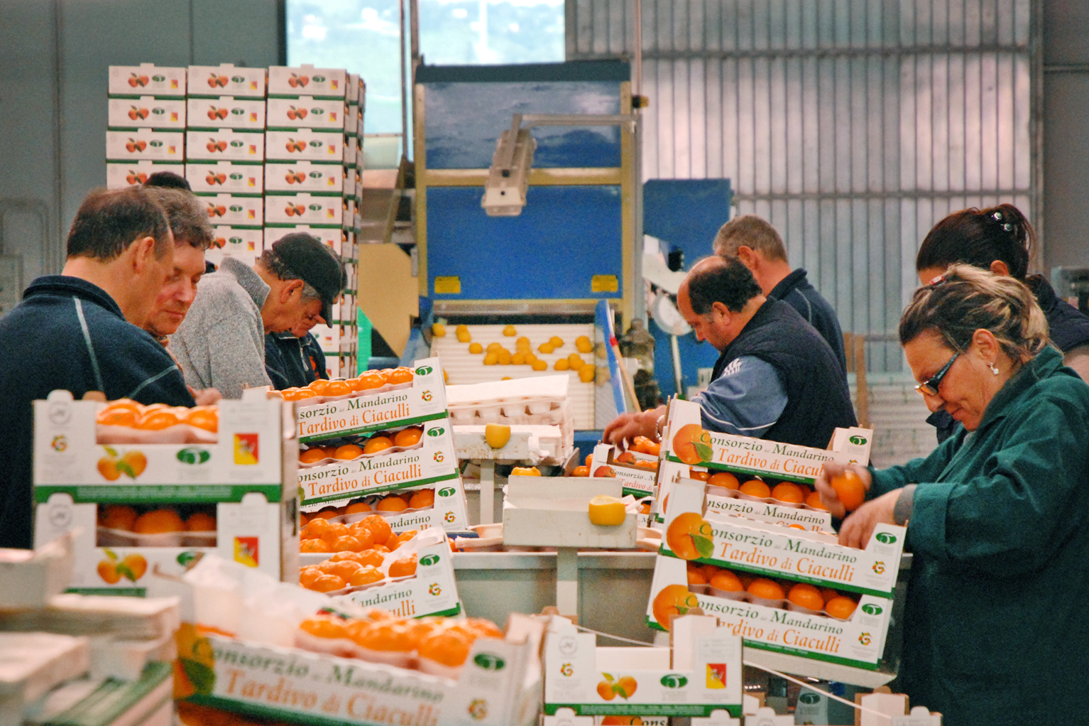 Zone de conditionnement Consorzio di Mandarino Tardivo di Ciaculli Le Consortium "Tardivo di Ciaculli" a été créée en janvier 1999, il a pour but de promouvoir toutes les initiatives visant à protéger, améliorer et développer les zones agricoles et leurs productions de grande qualité situées dans la Conca d'Oro à Palerme. L'usine de tri et de conditionnement des agrumes est visitable sur rendez-vous. Site officiel